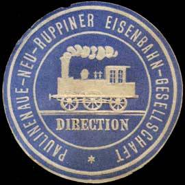 Siegelmarke der Paulinenaue-Neuruppiner Eisenbahn-Gesellschaft. Diese wurde 1923 von der Ruppiner Eisenbahn AG aufgekauft.